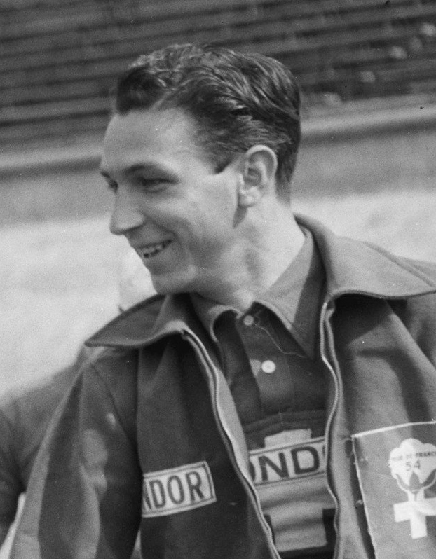 Tour de France, vertrek uit Amsterdam (...) [Carlo Clerici] (features, bike number: 51)